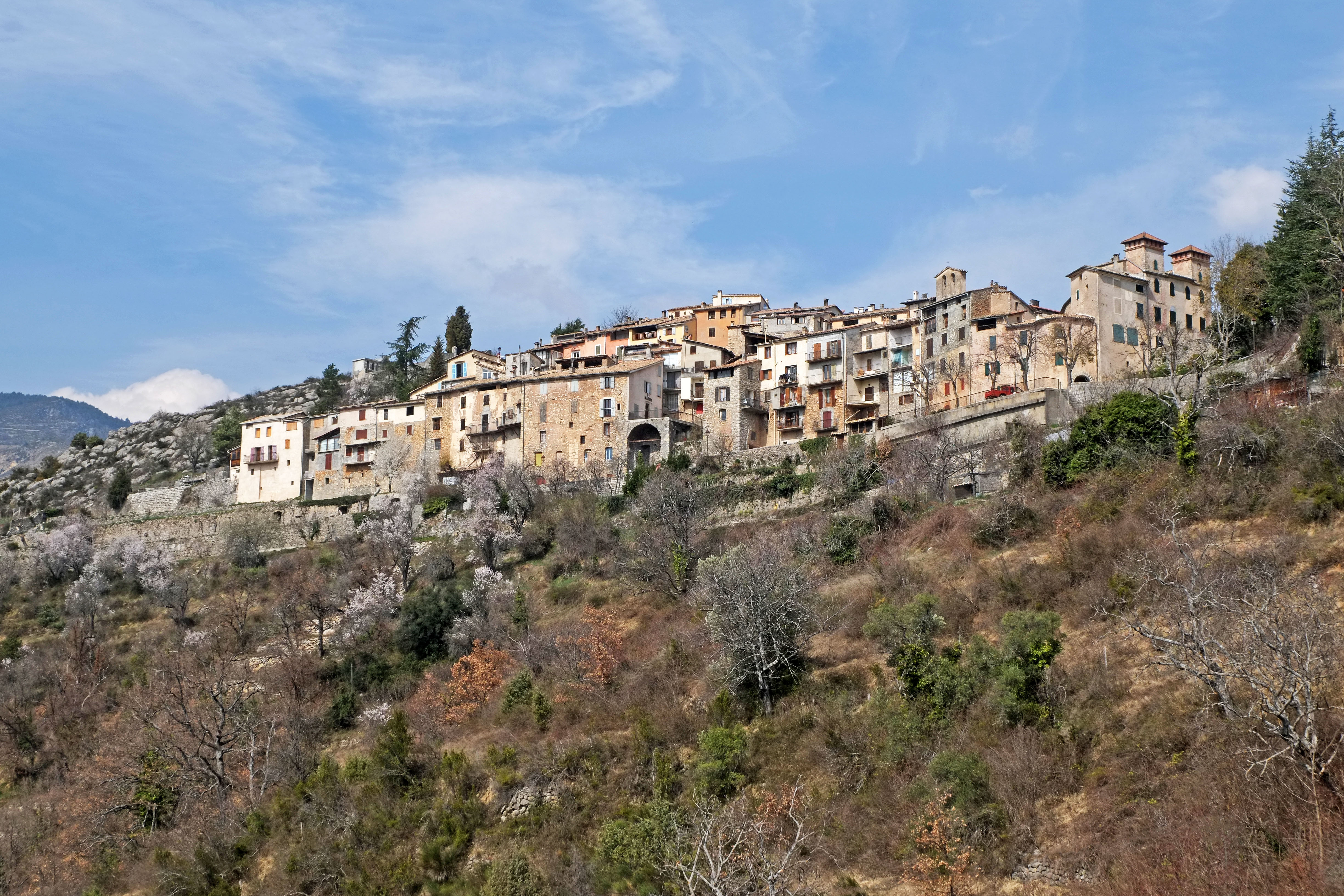 Vue du village de La Croix-sur-Roudoule en redescendant vers la vallée